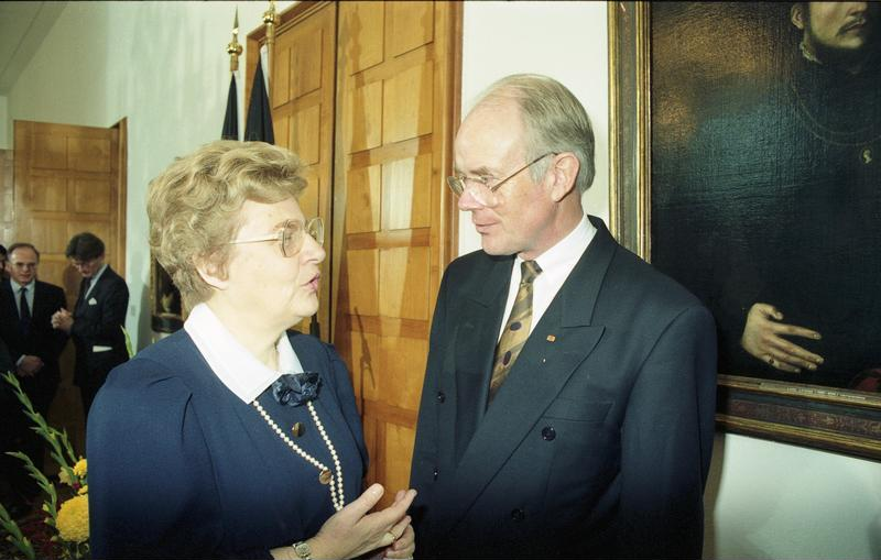 Bonn, 17. November 1989 Bundeskanzler Dr. Helmut Kohl gab im Palais Schaumburg den traditionellen Empfang für das Diplomatische Korps.